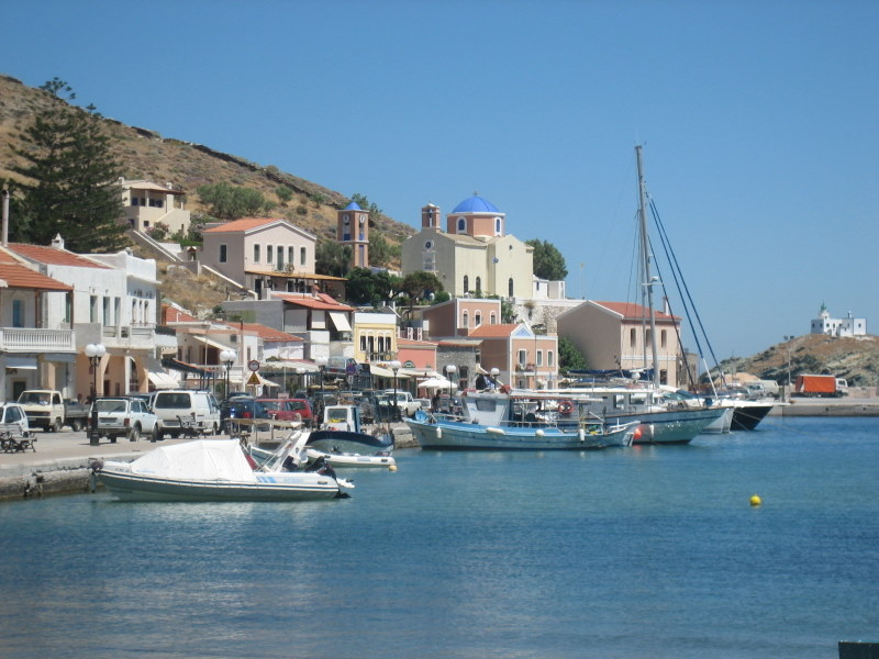 Der Hafenort Korissía auf Kea